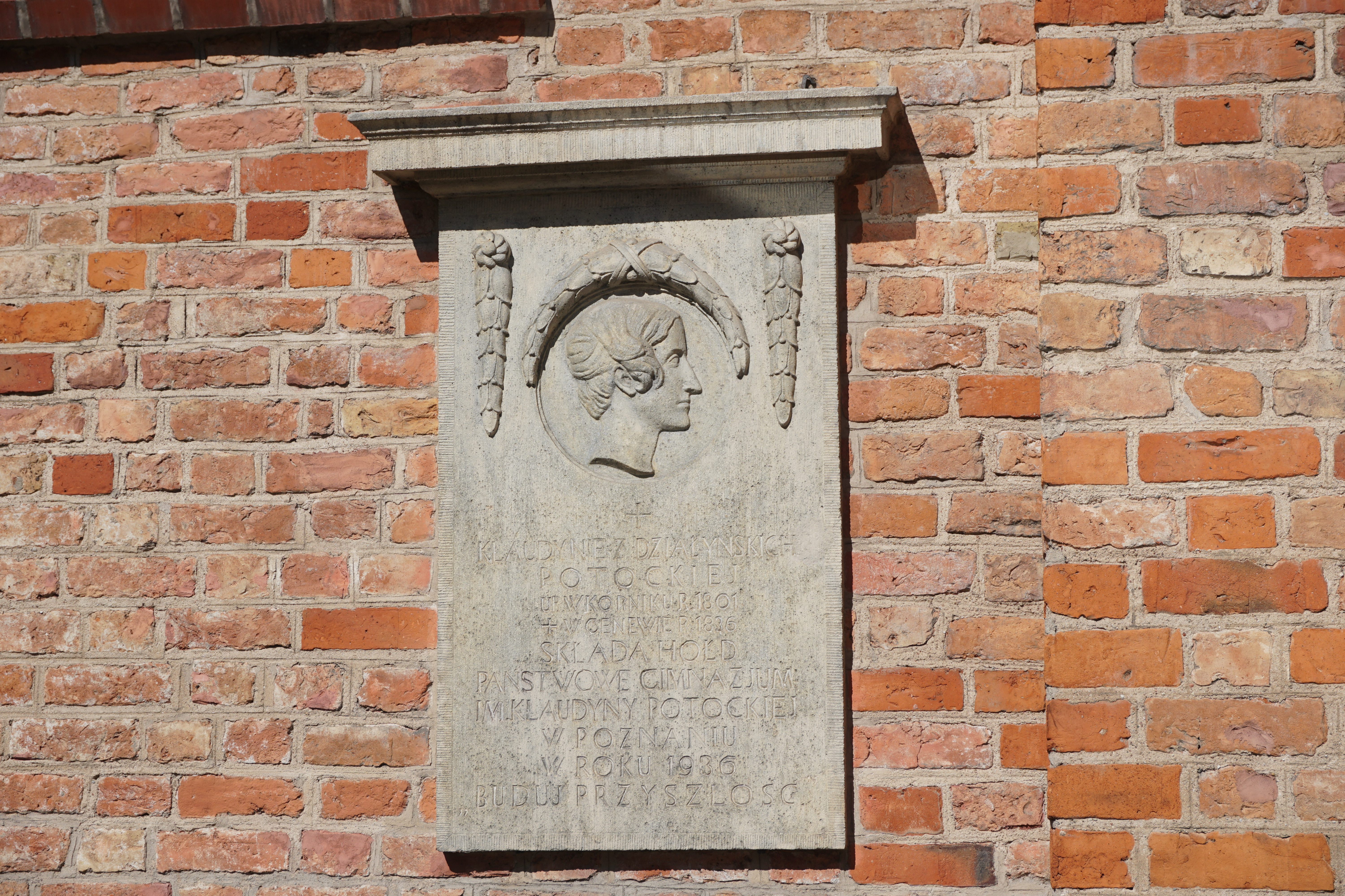 epitafium na południowej ścianie kościoła św. Wojciecha w Poznaniu